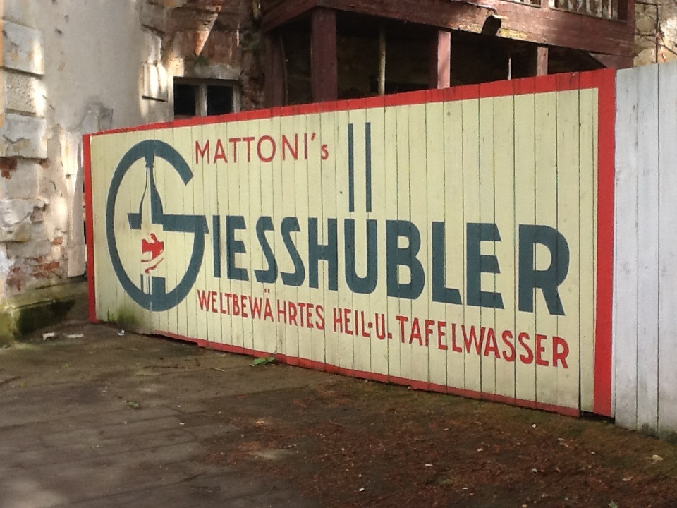 Jindřichův dvůr Lázně Kyselka Giesshübler 2014